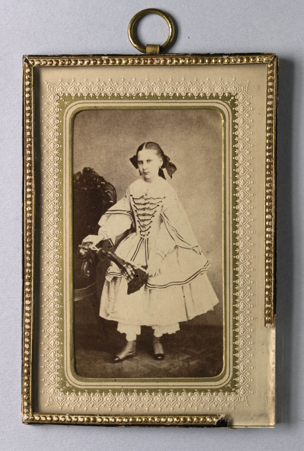 Porträtt av prinsessan Lovisa, 1861. Fotografi i visitkortsformat med passpartout och glas. Nordiska museet inv.nr 113417.